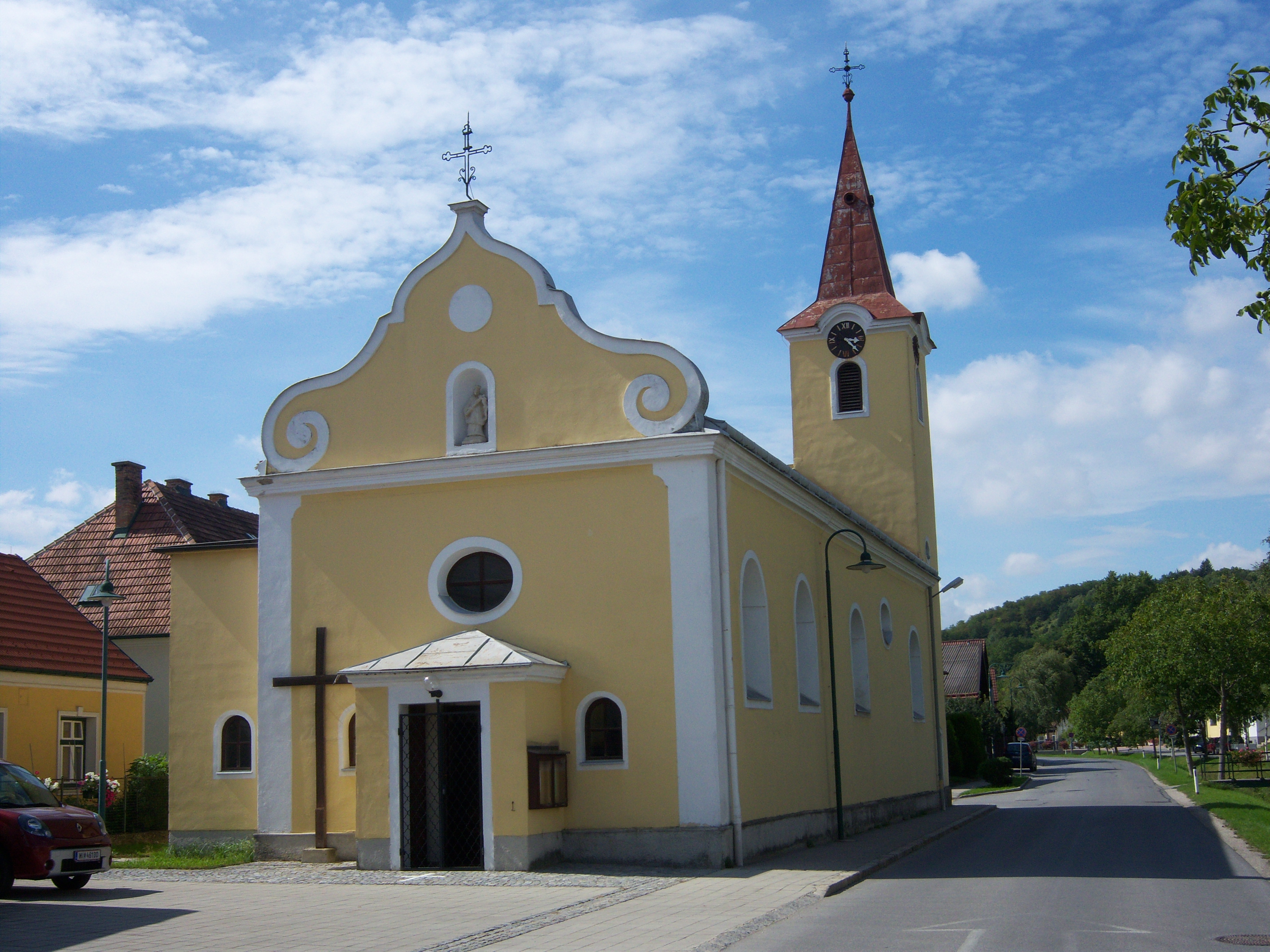 Katholische Pfarrkirche heiliger Johannes Nepomuk in Münichsthal (Stadtgemeinde Wolkersdorf im Weinviertel)